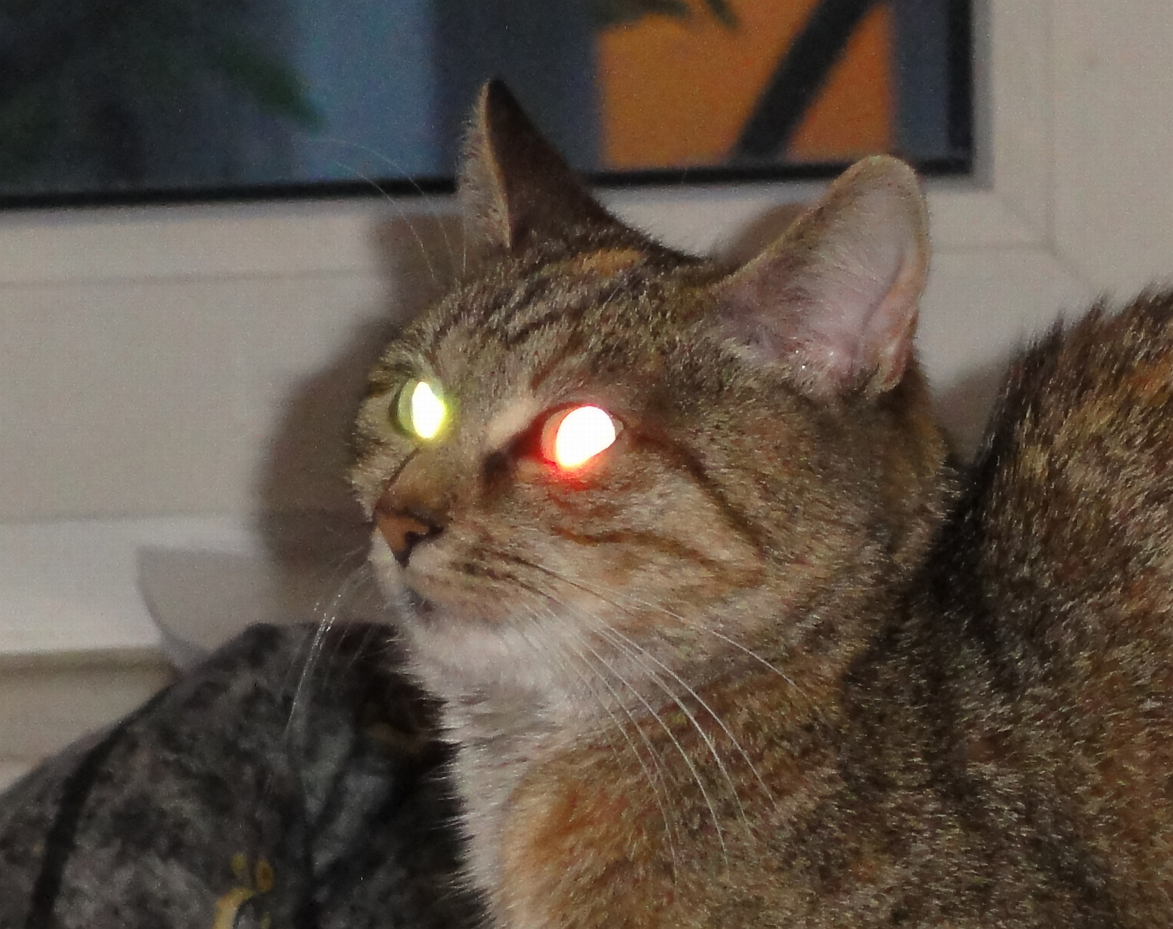 Retroreflexion bei Katzenaugen; aufgrund des verschiedenartigen Auftreffens der Lichtstrahlen auf das tapetum lucidum hier verschiedenfarbig.